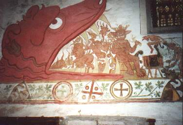 Kirche Behrenhoff - mittelalterliche Wandmalerei